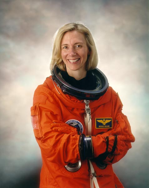 portrait astronaut Susan Still-Kilrain